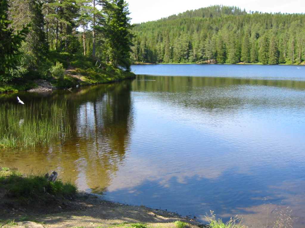 Baklidammen lake in summer, Bymarka, Trondheim. July 24 2006. Picture taken by myself.